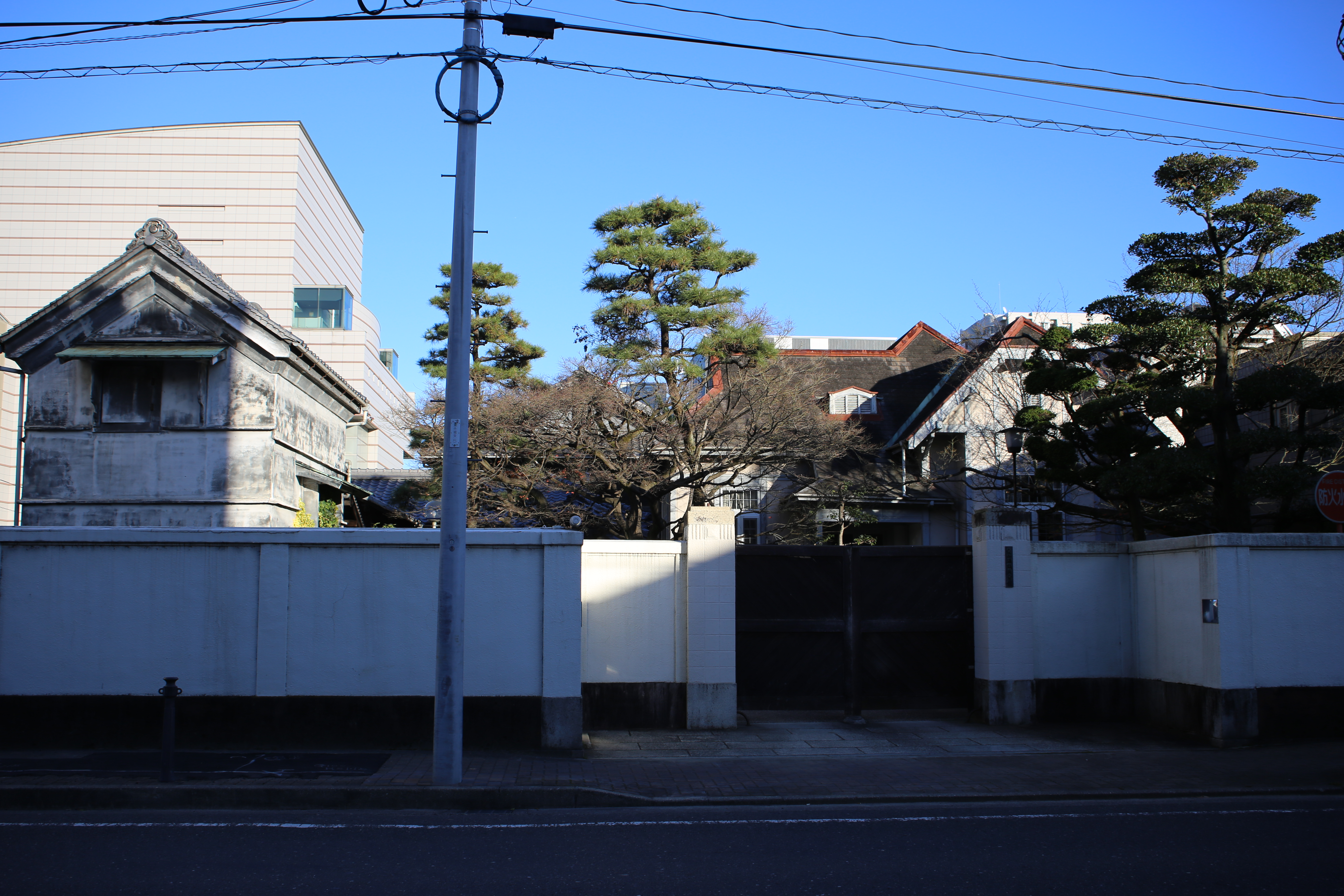 名古屋市東区東外堀町の愛知県議員会館（旧大喜多寅之助私邸・事務所）を西側公道より撮影